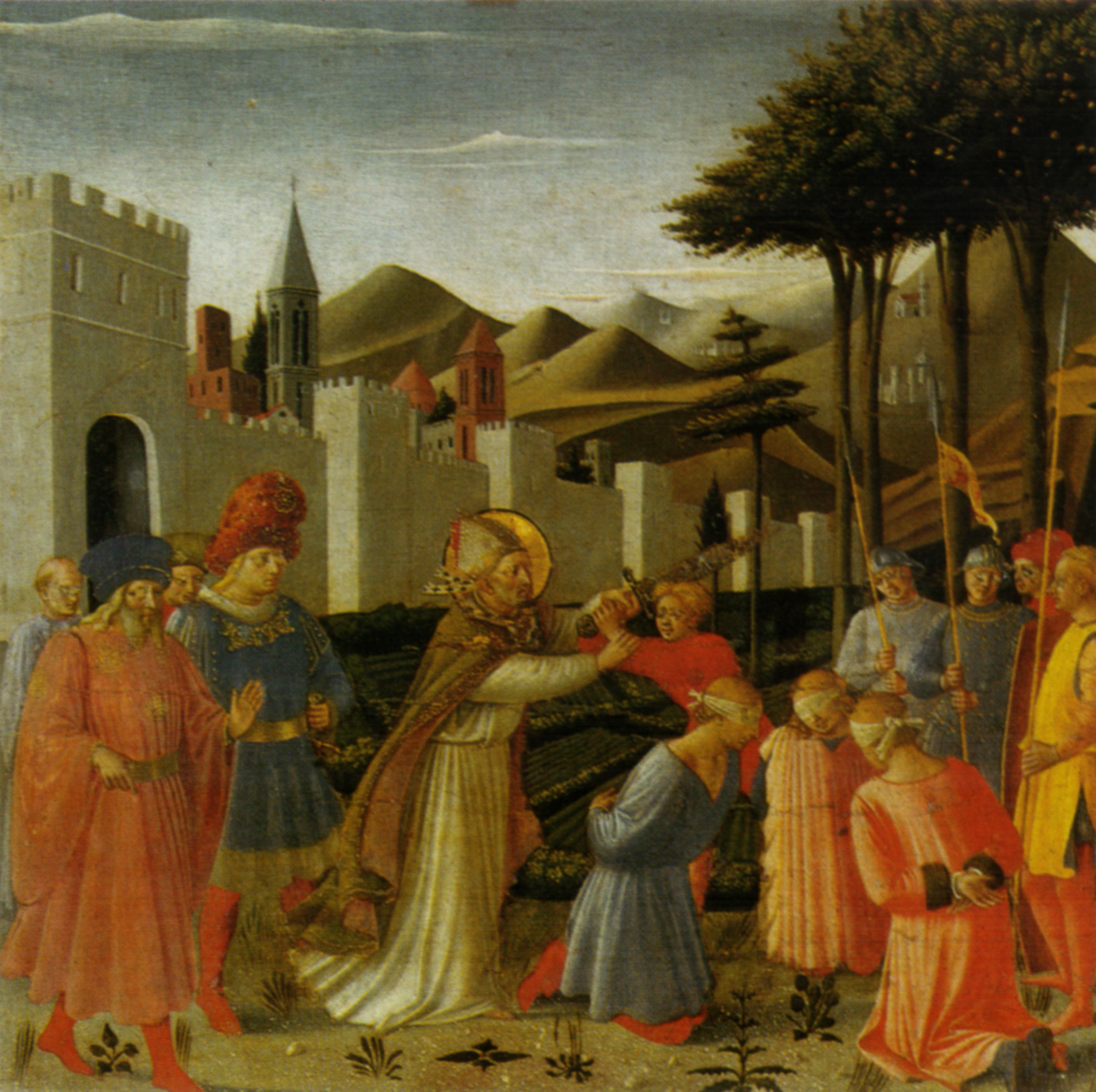 polittico di Perugia